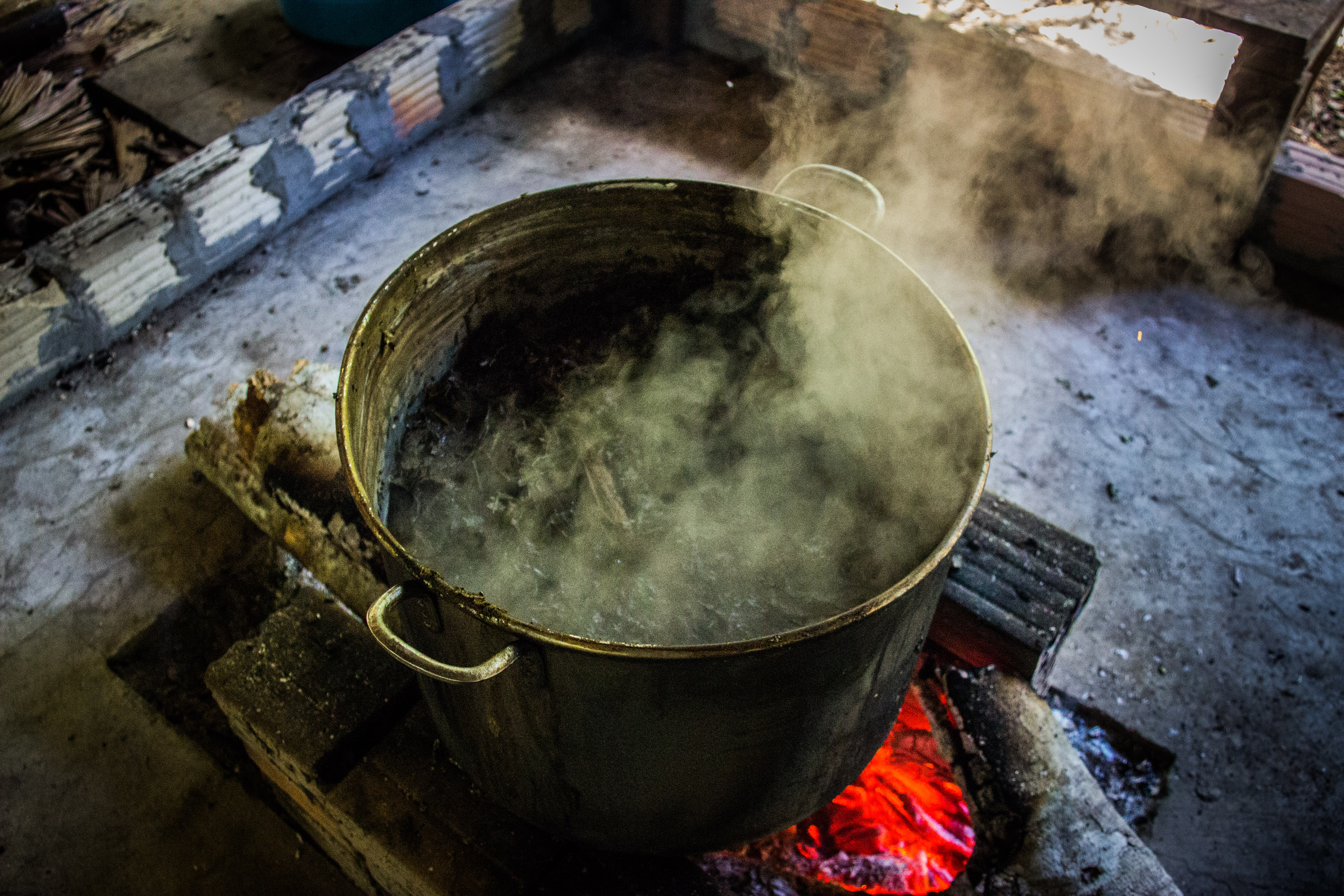 Decocción de ayahuasca en Iquitos, Perú.